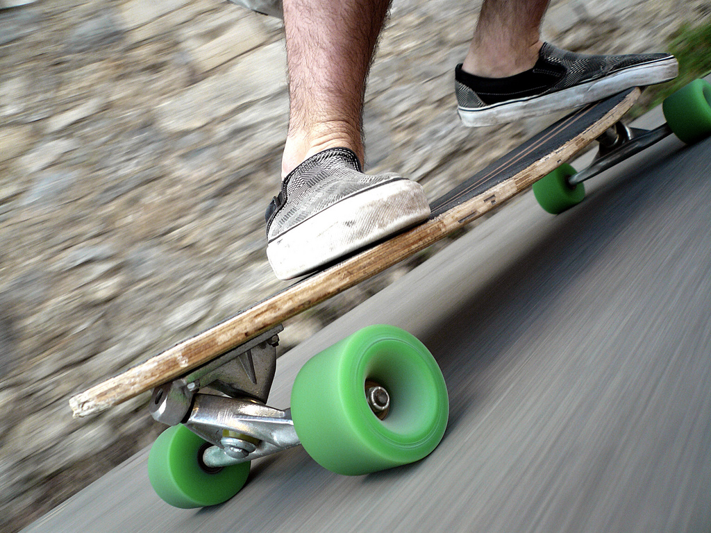 лонгбоардинг